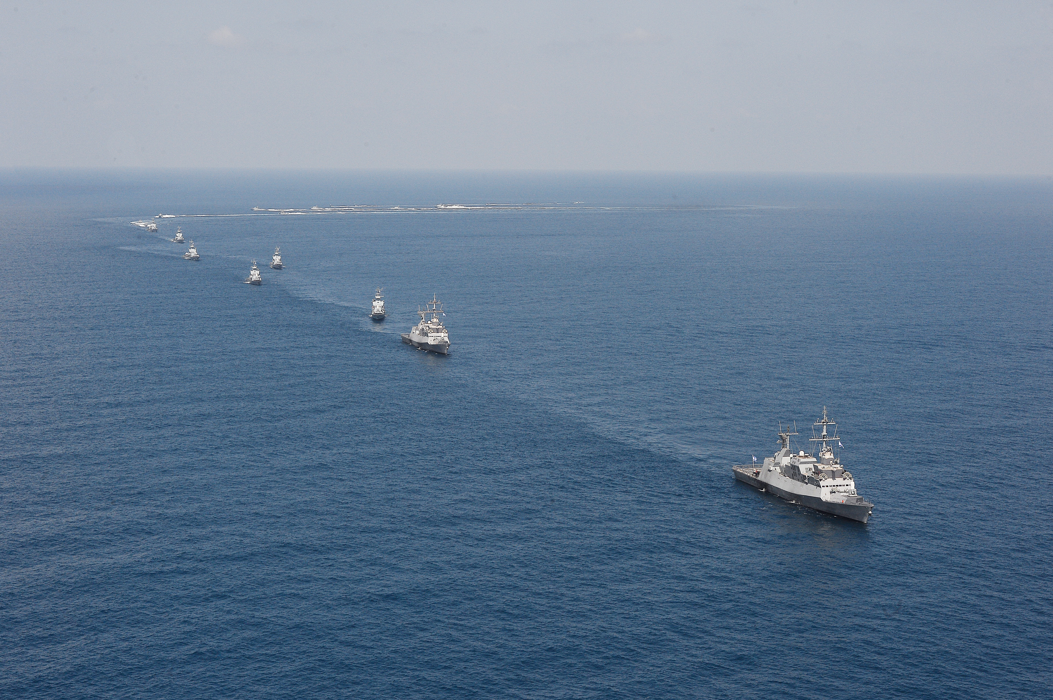 משט חגיגי